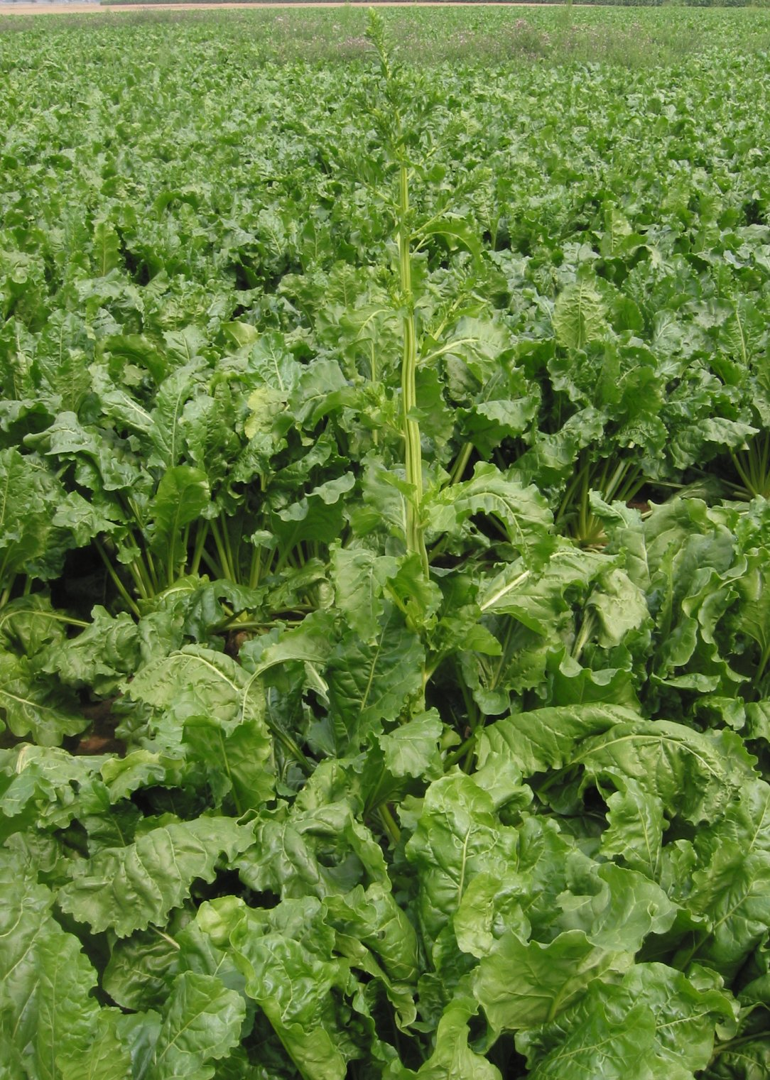 (nl: Suikerbiet bloeistengel) Beta vulgaris inflorescence stem